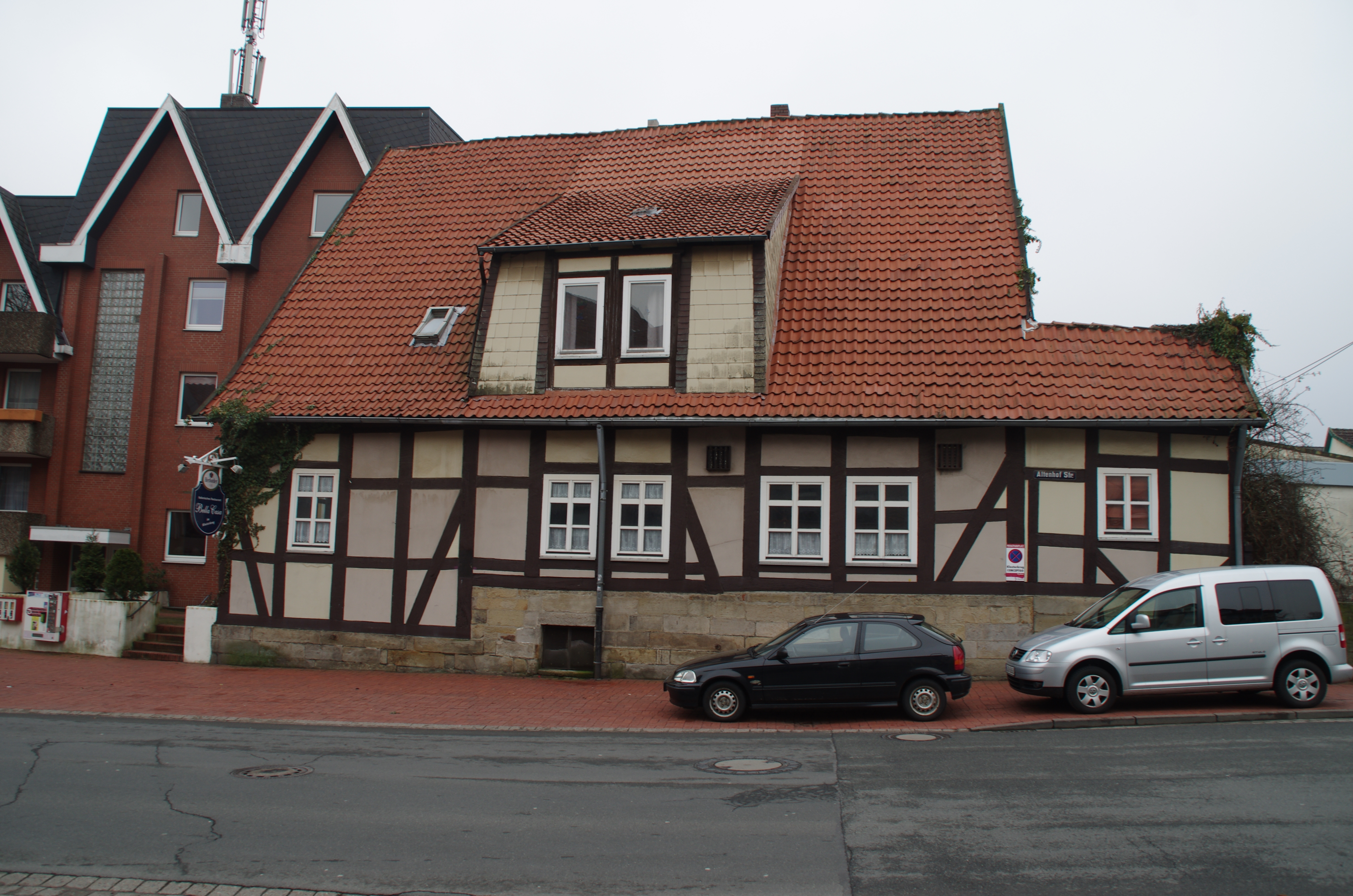 Barsinghausen in Niedersachsen. Das Haus Altenhofstraße 1B steht unter Denkmalschutz.